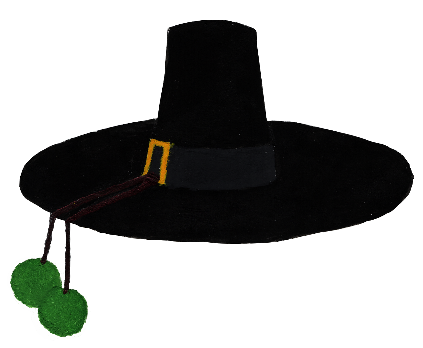 Dessin du chapeau de Don Salluste (Louis de Funès) dans le film La Folie des grandeurs.